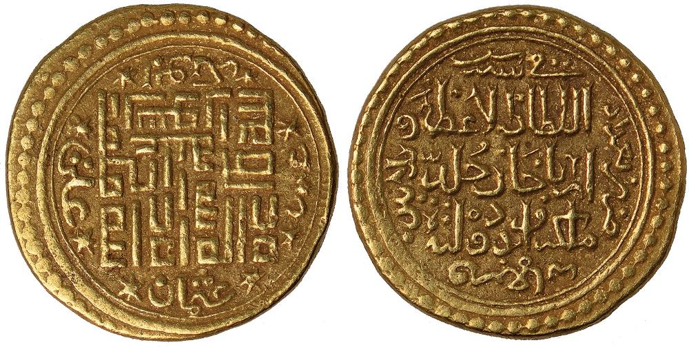 سکه دینار آرپاخان ضرب بغداد روی سکه: لا اله الا الله محمد رسول الله نام چهار خلیفه در حاشیه پشت سکه: السلطان الاعظم ارباخان خلد الله ملکه و دولته ضرب بغداد